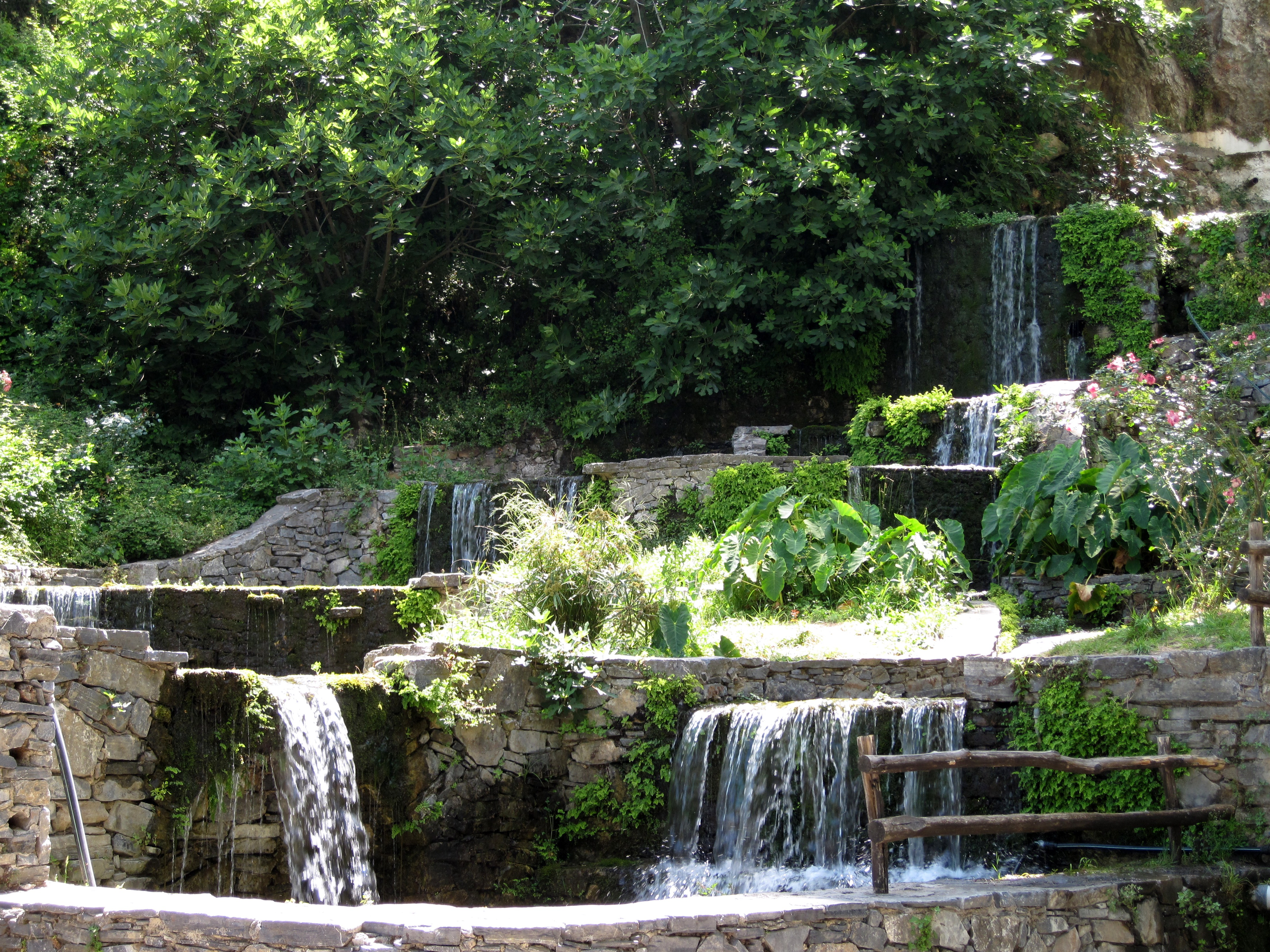 Wasserfall unterhalb von Argyroupoli, Gemeinde Rethymno, Regionalbezirk Rethymno, Kreta, Griechenland